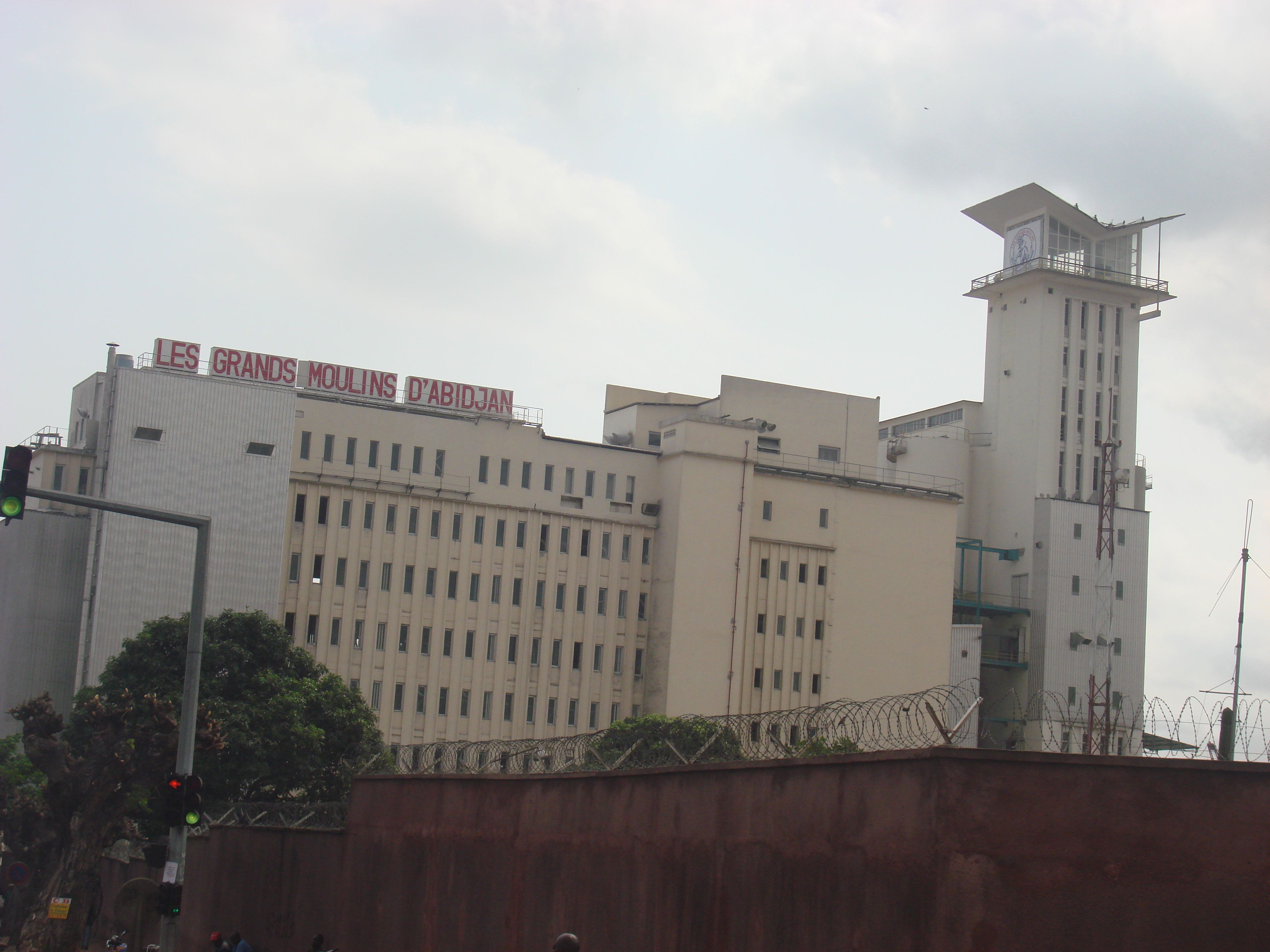 Grand moulin d'Abidjan (Côte d'Ivoire)